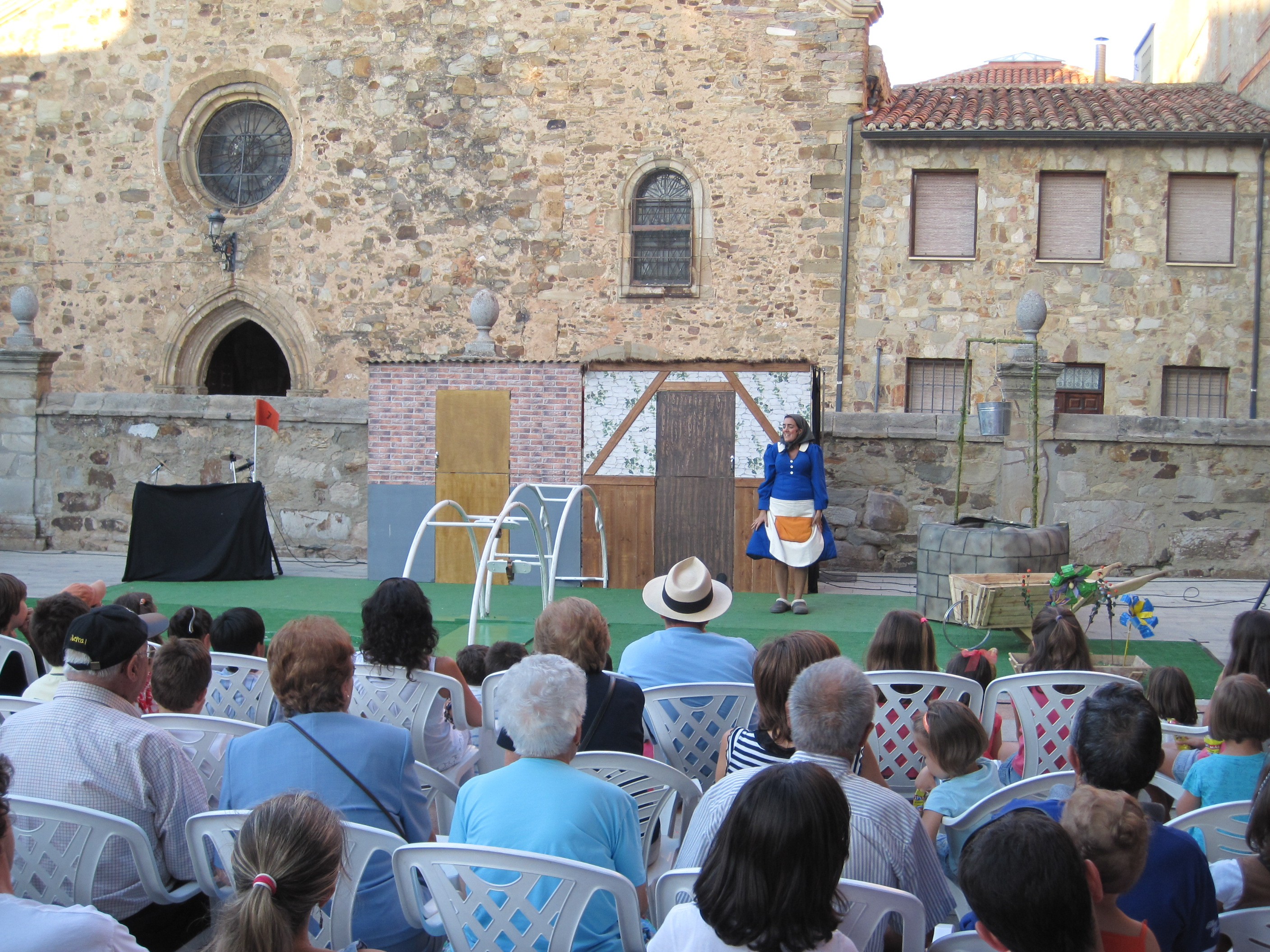 Momento de la representación de la obra "Golf & Folk", de la compañía Asaco Producciones, durante las fiestas de Astorga de 2010 dentro del programa de teatro de calle "Ars Via".